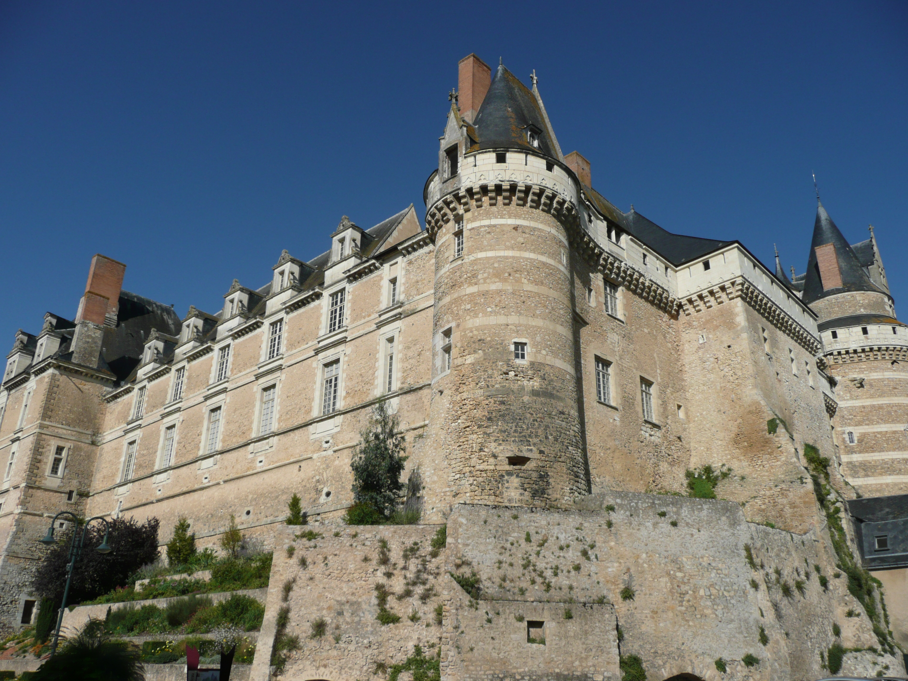 Château de Durtal .